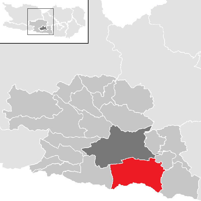 Bezirk Villach-Land